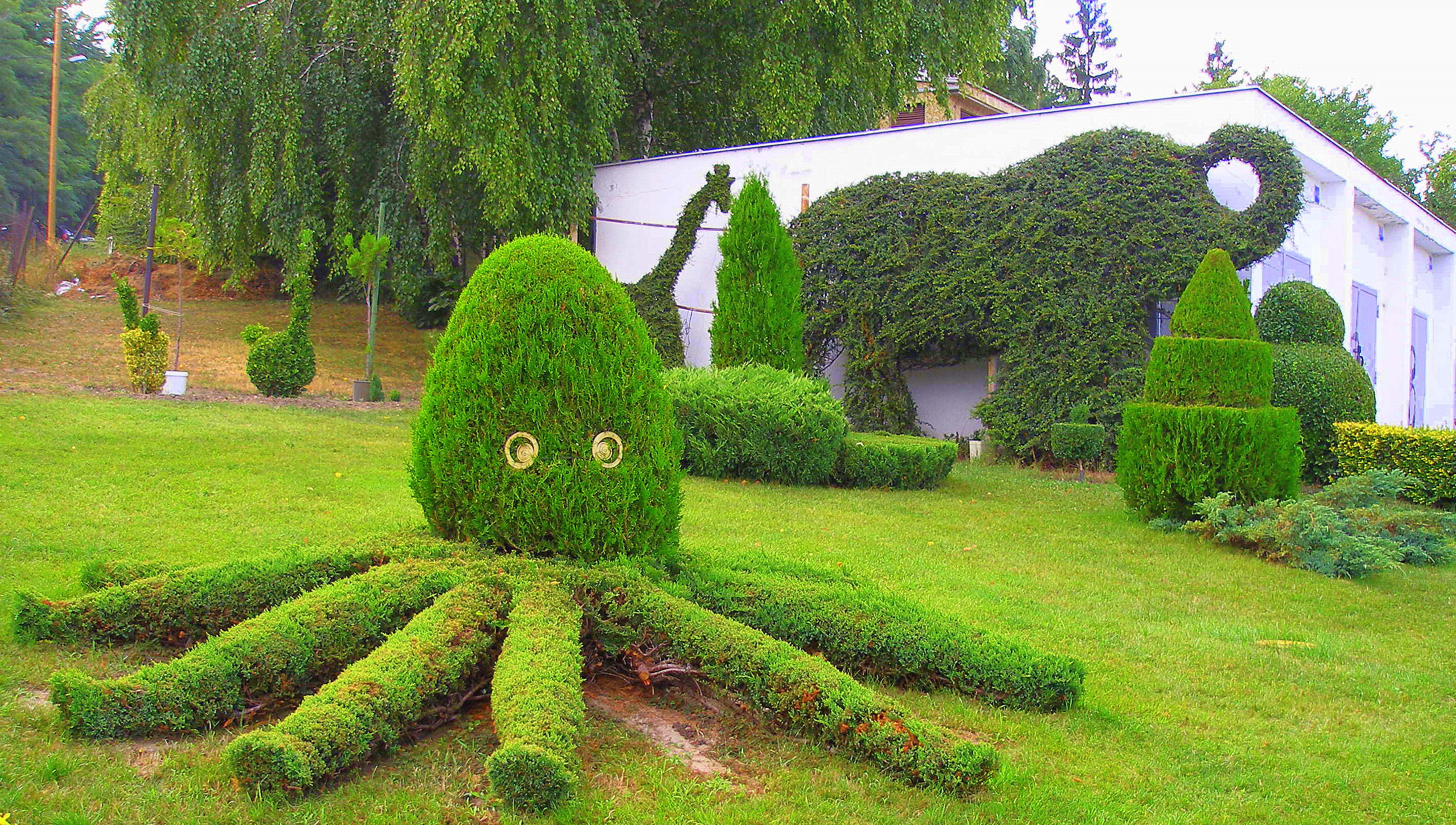 Ozdobný živý plot v Karlovej Vsi, Bratislava. Zvieratá z kríkov. Umenie "topiary", umelecké rezanie a tvarovanie živých plotov a kríkov, ktoré sa premenia na umelecké diela.